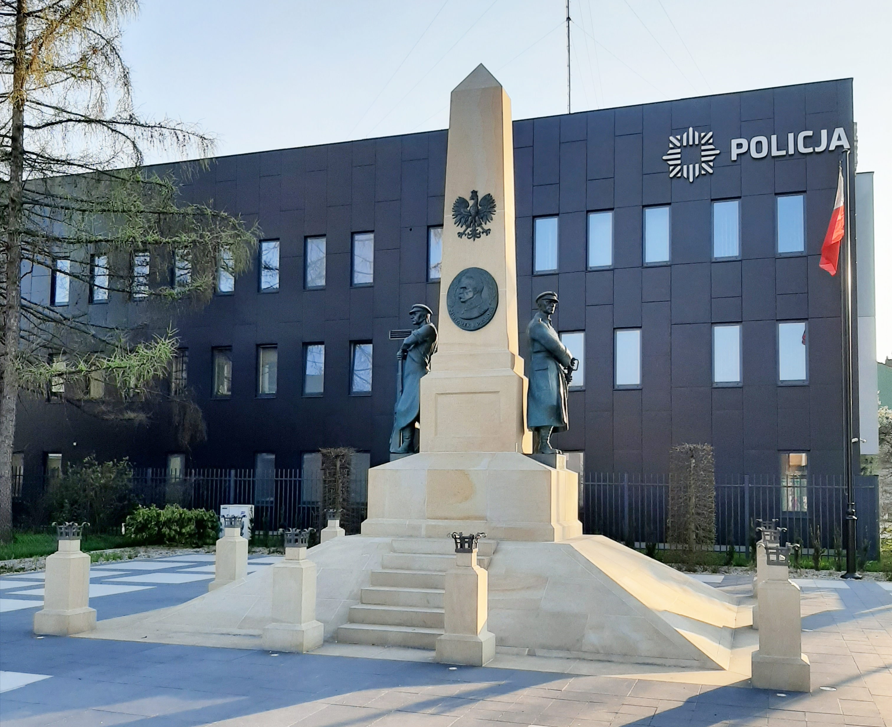 Pomnik Wolności w Czechowicach-Dziedzicach (odsłonięty 10.11.2018), stanowiący replikę pomnika zburzonego w 1939. Pierwszy pomnik powstał Pomnik Wolności w Dziedzicach został uroczyście odsłonięty 14 września 1924 roku na gruntach darowanych przez miejscowego Żyda Dawida Schneebauma, zaprojektowany przez Jana Raszkę. Był to symbol wdzięczności mieszkańców na pamiątkę wymarszu Legionistów w 1914 roku oraz za przyłączenie ziemi śląskiej do Rzeczypospolitej.